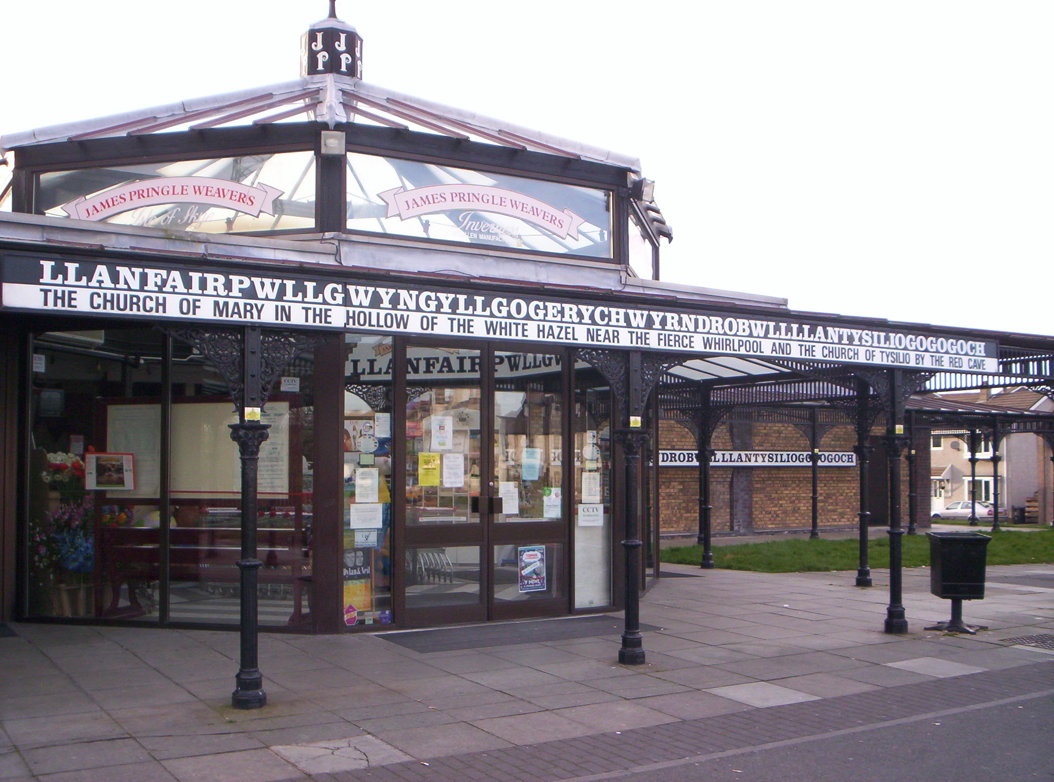 A estação de Llanfairpwllgwyngyllgogerychwyrndrobwllllantysiliogogogoch, ao fim da tarde.